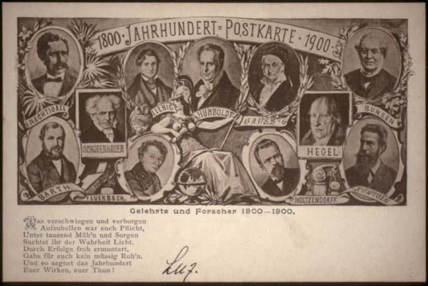 Gelehrte und Forscher 1800 - 1900. Postkarte ; s/w ; Querformat. Bildinschrift: 1800 Jahrhundert-Postkarte 1900 Nachtigall ; Schopenhauer ; Liebig ; Humboldt ; Gauss ; Hegel ; Bunsen ; Barth ; Feuerbach ; Holtzendorff ; Röntgen Bildunterschrift: Gelehrte und Forscher 1800 - 1900. Was verschwiegen und verborgen Aufzuhellen war euch Pflicht, Unter tausend Müh'n und Sorgen Suchtet ihr der Wahrheit Licht. Durch Erfolge froh ermuntert, Gabs für euch kein müssig Ruh'n. Und so segnte das Jahrhundert Euer Wirken, euer Thun! Rechte/Sperrvermerk: UHI Angaben zur Digitalisierung: Scanvorlage, Qualität: Original Zitierfähige URL